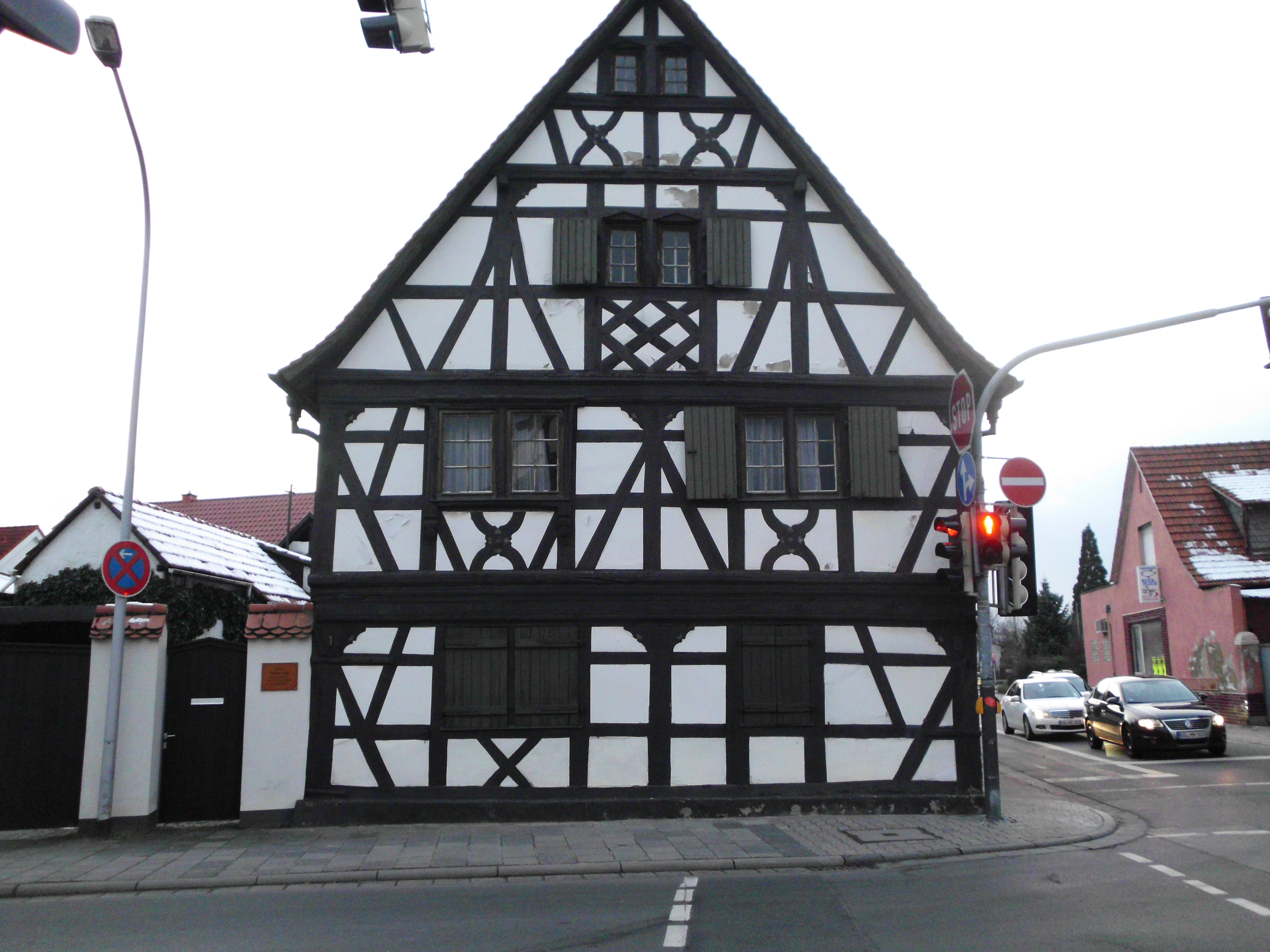 Nikolose-Haus (17.Jahrhundert)